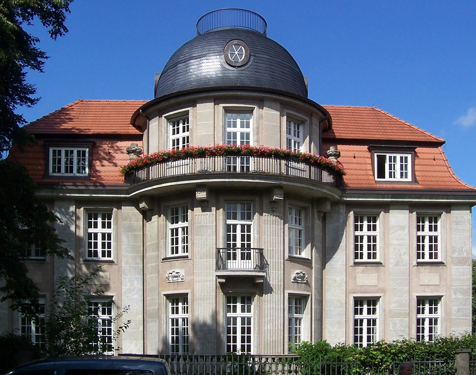 Troplowitz-Haus, Agnesstraße 1 in Hamburg. Erbaut 1908/09, Architekt William Müller (1871–1913)This is a photograph of an architectural monument.